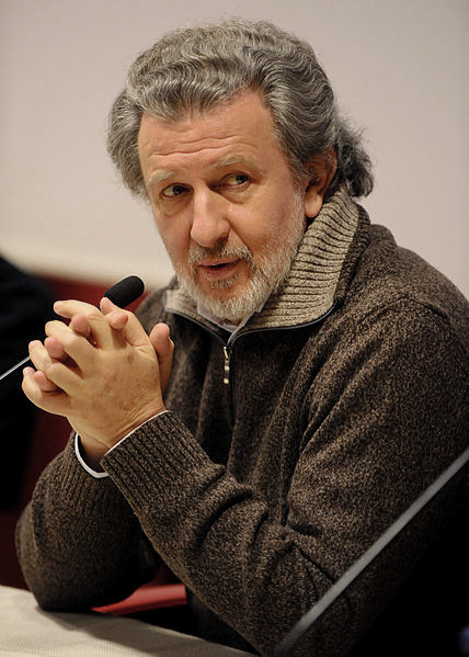 Piergiorgio Odifreddi a Trento per il seminario "La musica della matematica".